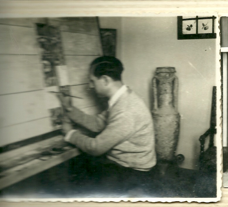 Ceramista de Barcelona que als anys 50´s va encapçalar un moviment de restauració de la ceràmica catalana